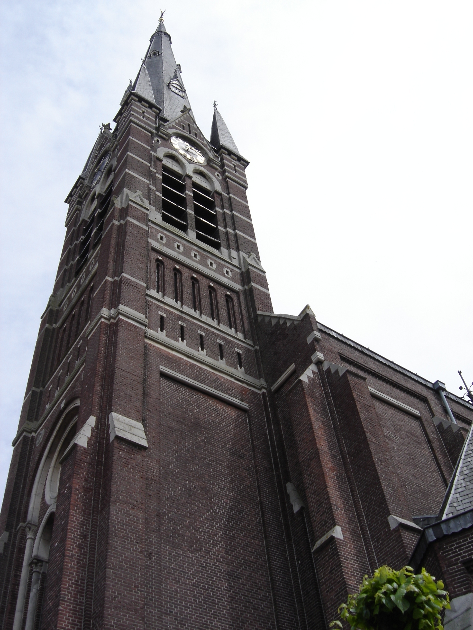 Zicht op de Sint-Gummaruskerk gelegen aan de Dorpsstraat 56 in het centrum van Wagenberg. (Afbeelding verkregen uit de privéverzameling van Sjors van der Giessen)